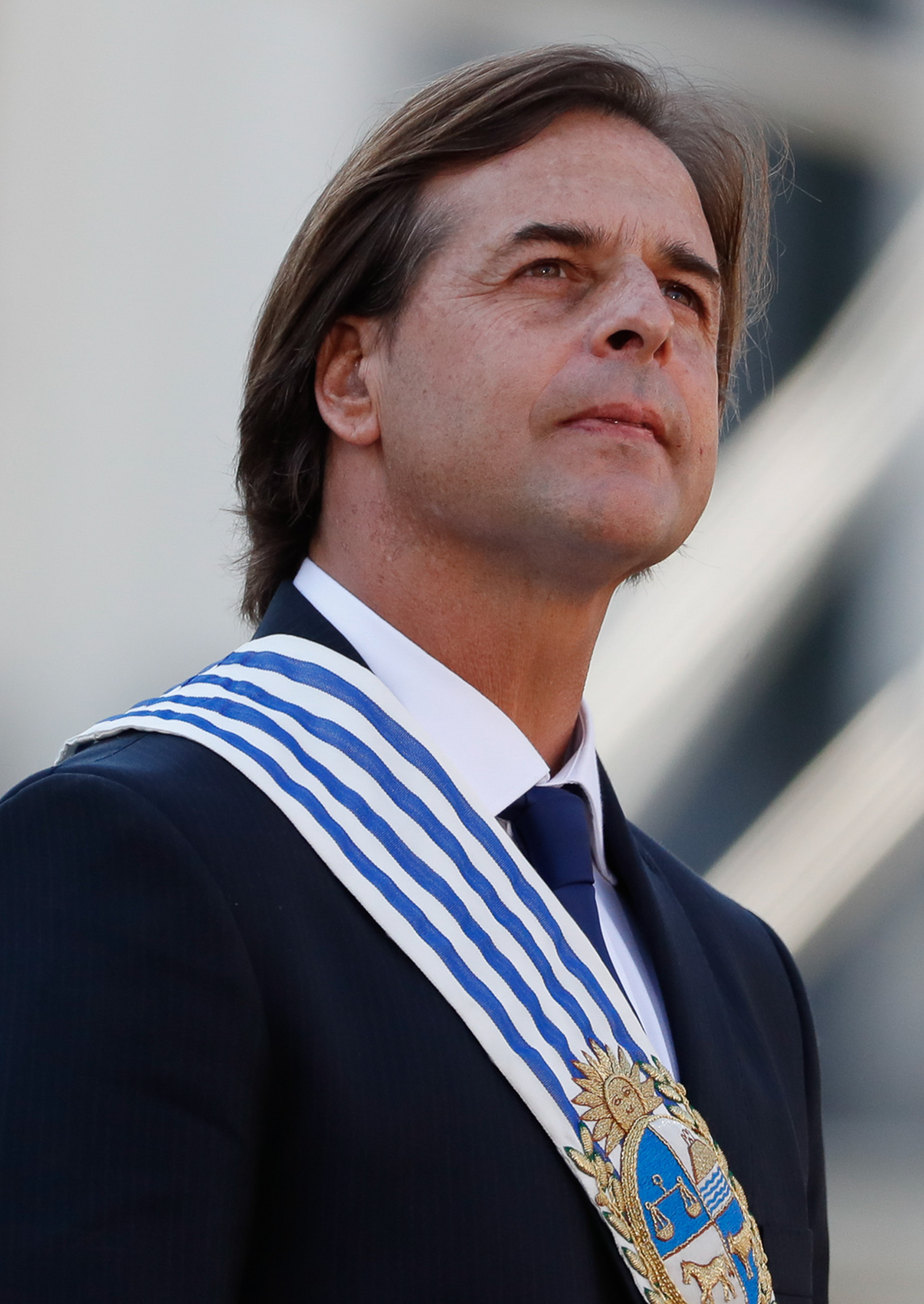 (Montevidéu - Uruguai, 01/03/2020)Transmissão da Faixa Presidencial.